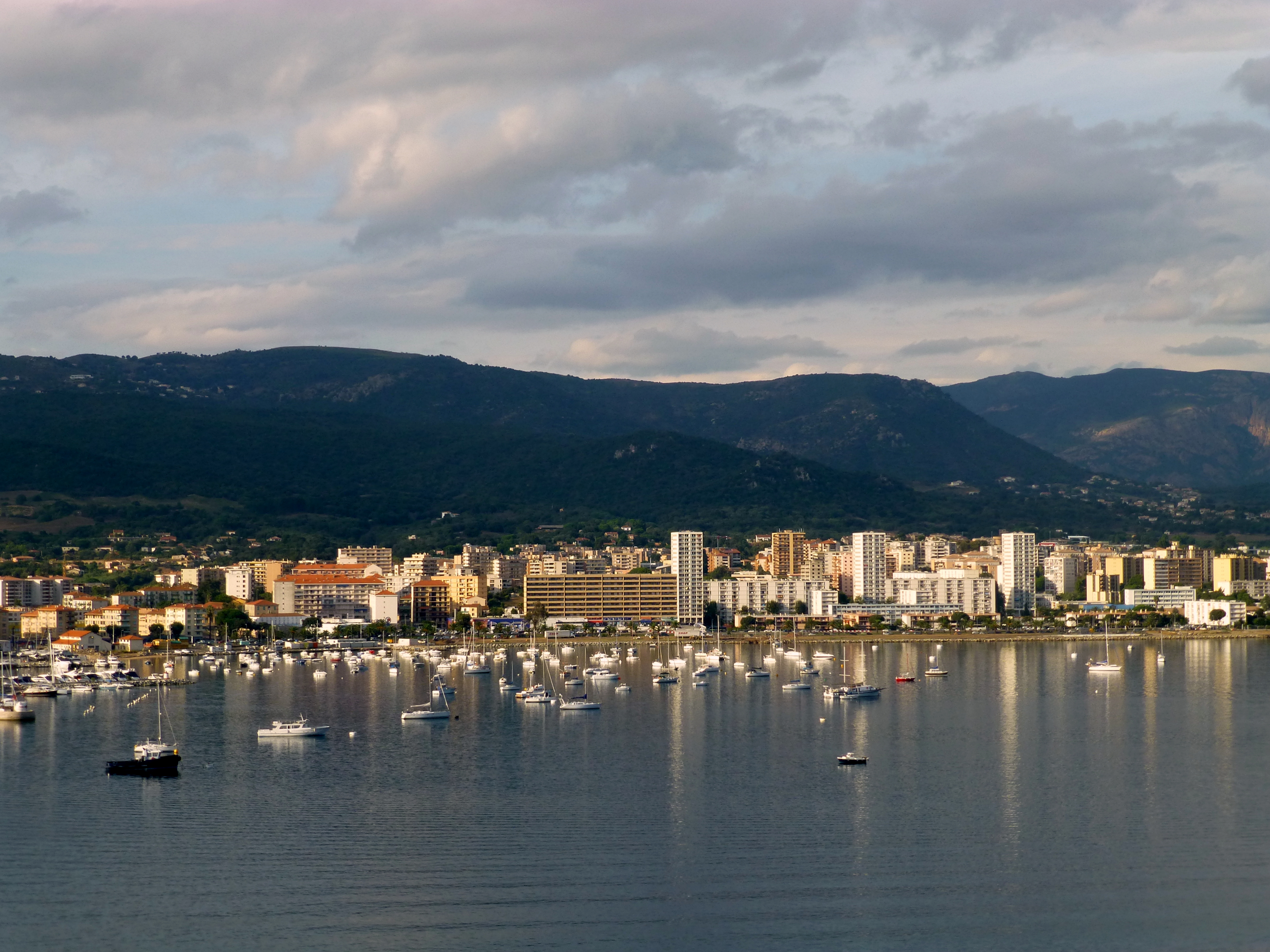 Korsika - Ajaccio – Pietralba